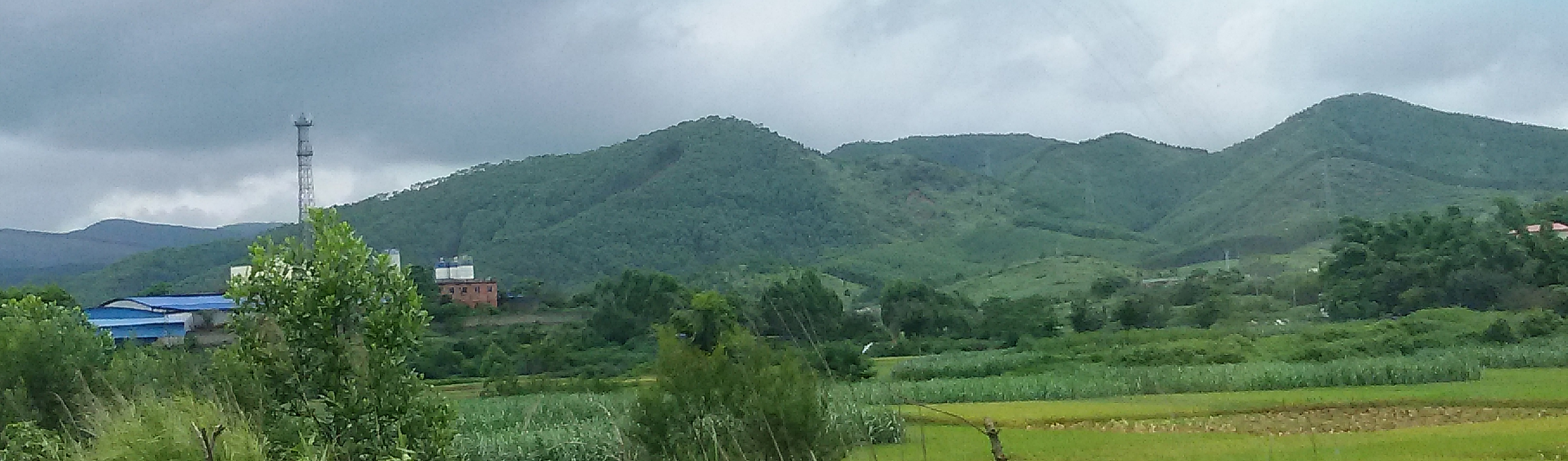 粵語: 十萬大山 Vahcuengh: Byalaux Cibfanh